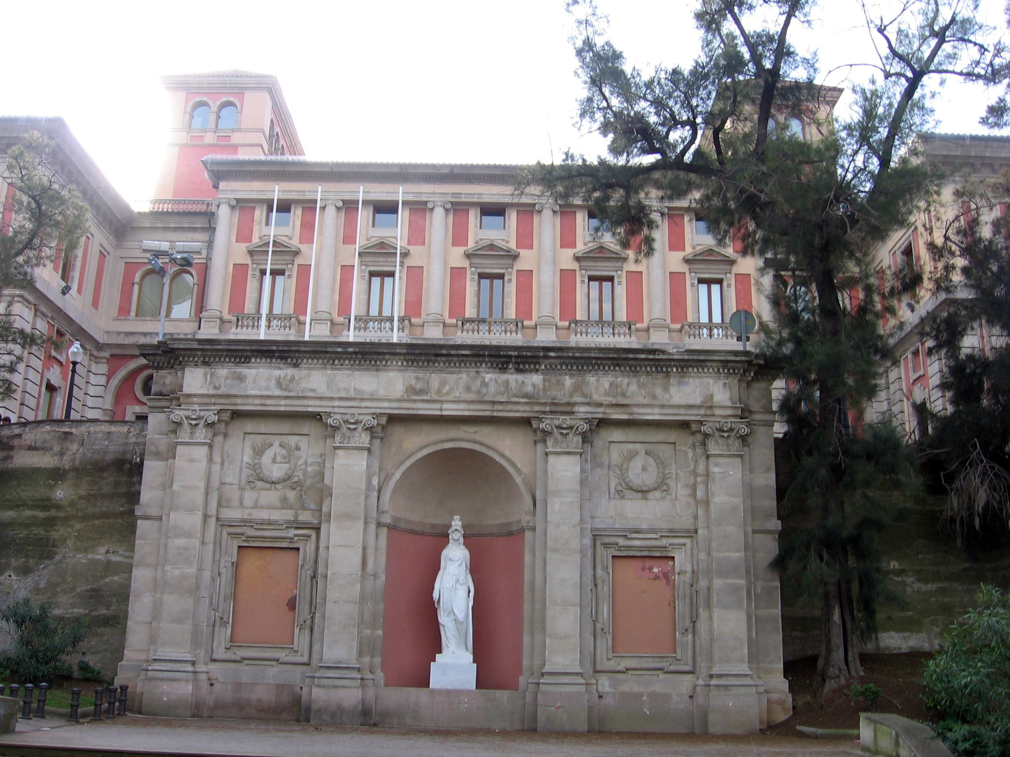 Pabellón de la Caixa, actual Instituto Cartográfico de Cataluña, Montjuïc (Barcelona)